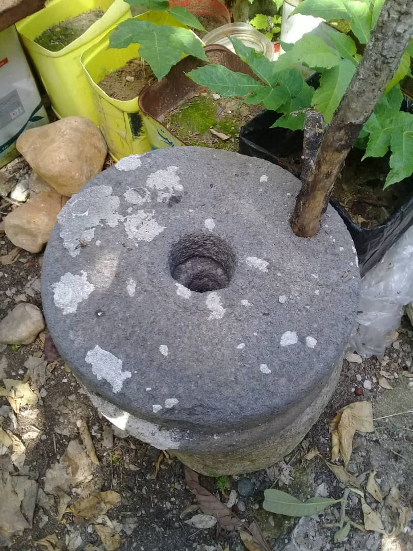 رحى لطحن الحبوب - قرية الجديدة - اللاذقية - سوريا